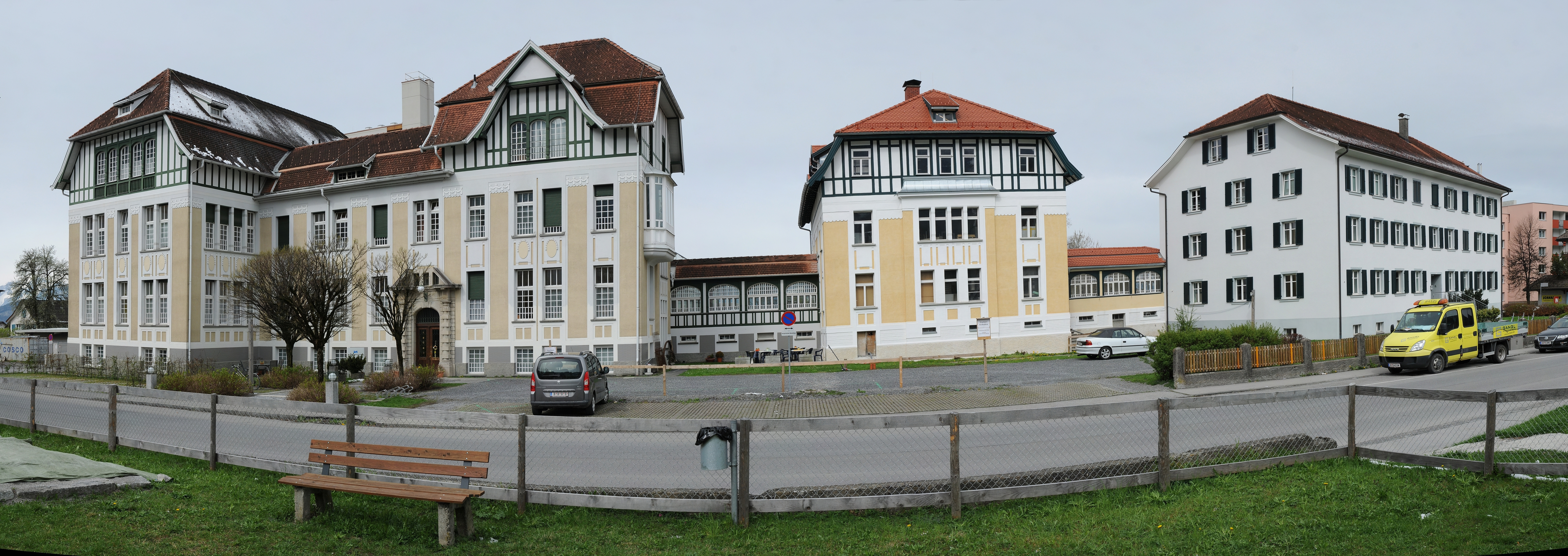 altes Krankenhaus, Kaiserin-Elisabeth-Str. 4-6 in Hohenems Architekt: Hanns Kornberger, Baujahr 1904 + 1905